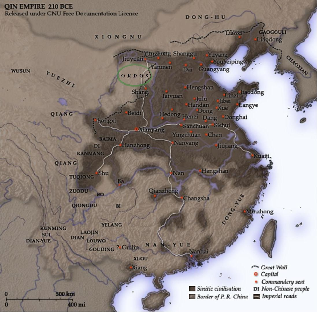 Ordos culture with Qin Empire